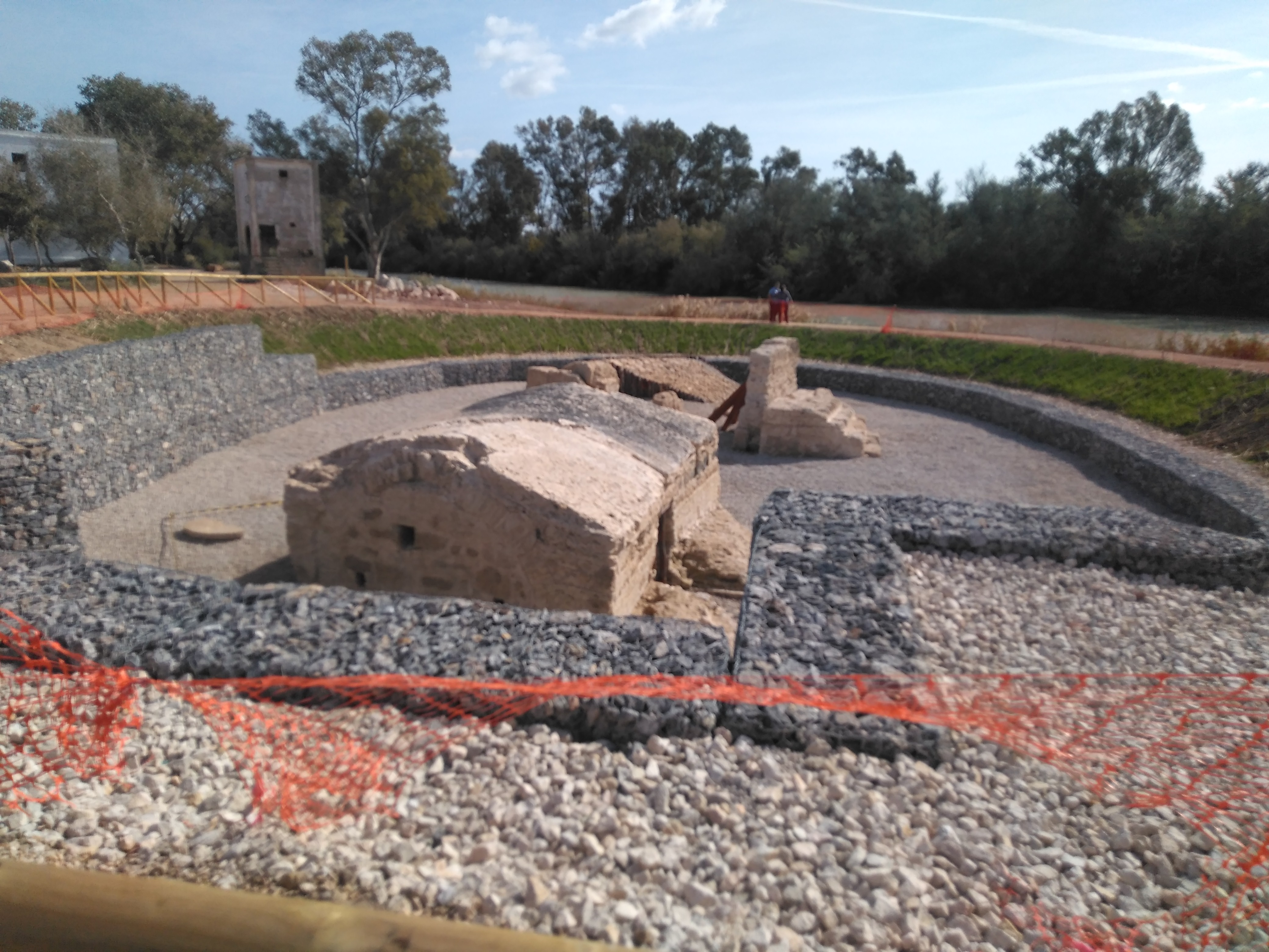 Molino romano de La Corta (Jerez, España) con el río Guadalete al fondo